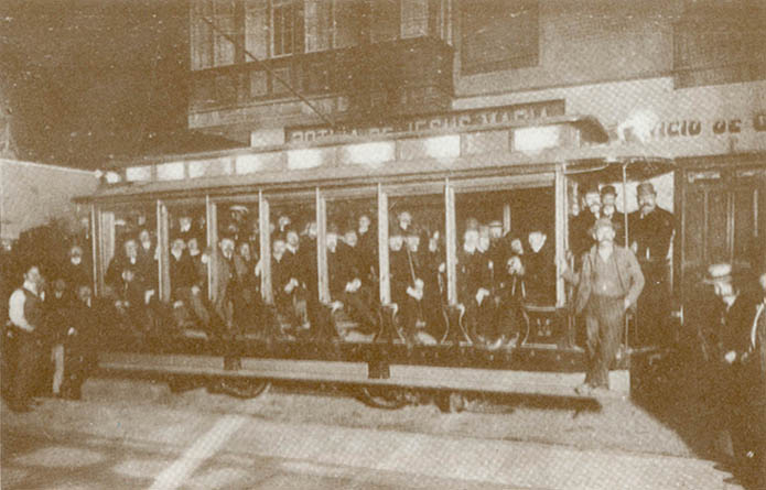 El Ferrocarril Urbano de Lima (FCUL) inauguró la primera línea de tranvías eléctricos (la ruta urbana Alameda de los Descalzos-Parque de la Exposición) la noche del Viernes 1 de Junio de 1906. La Foto muestra a los Ejecutivos y Personal del FCUL durante la inauguración de su sistema eléctrico